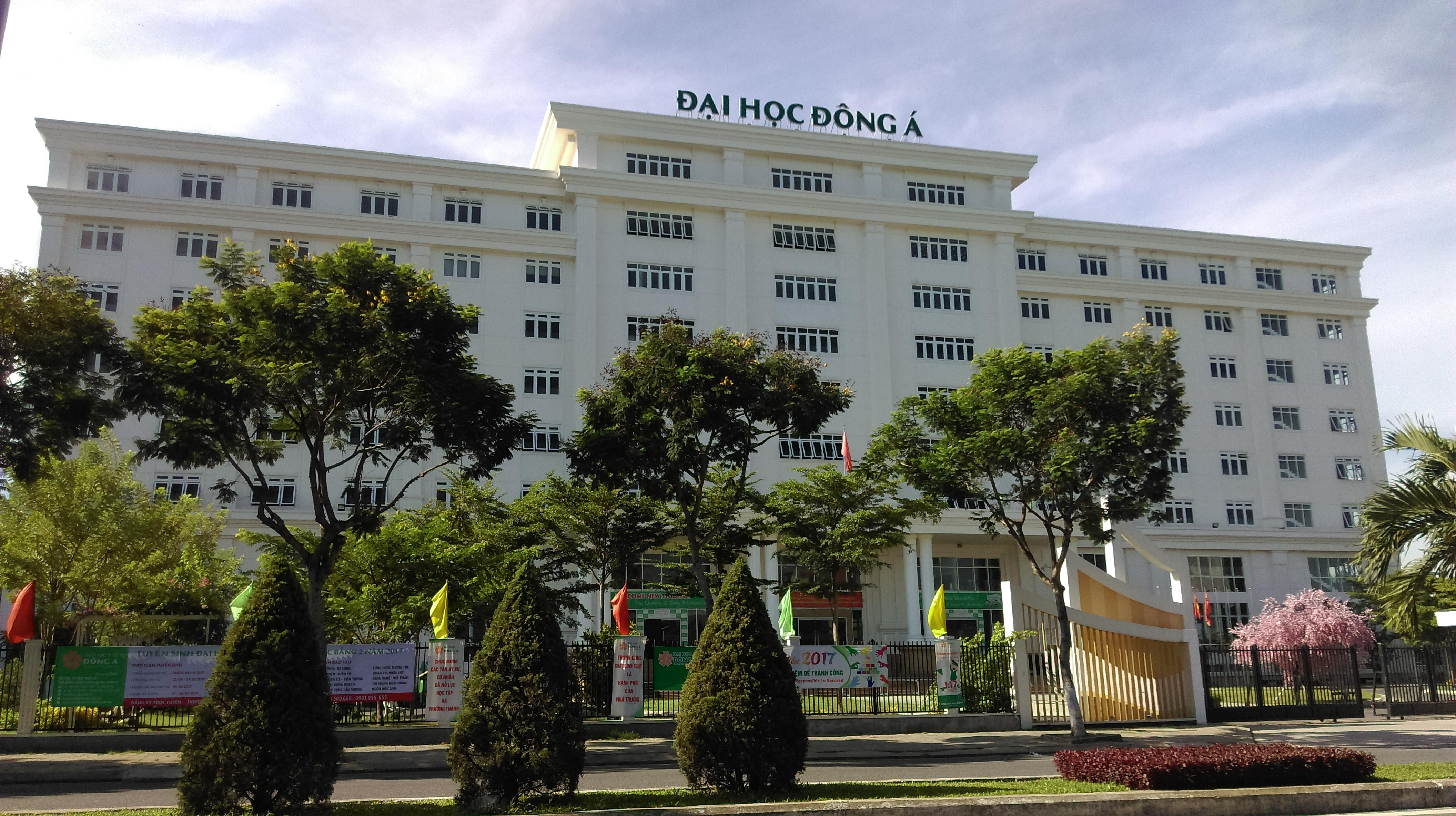 Trường Đại học Đông Á, Đà Nẵng